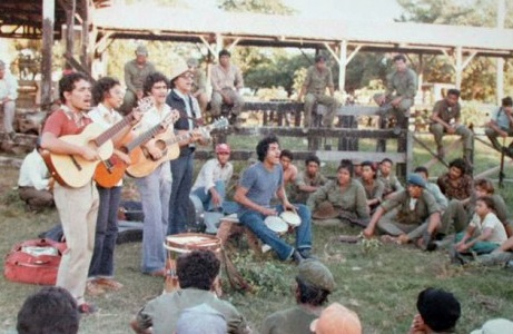 GrupoPancasán_en_base_militar,_Frente_Sur,_finales_de_julio_de_1979